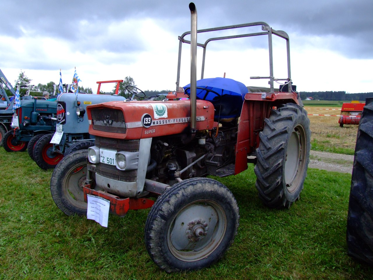 Massey Ferguson 133 Super mit 38 PS, Baujahr 1975